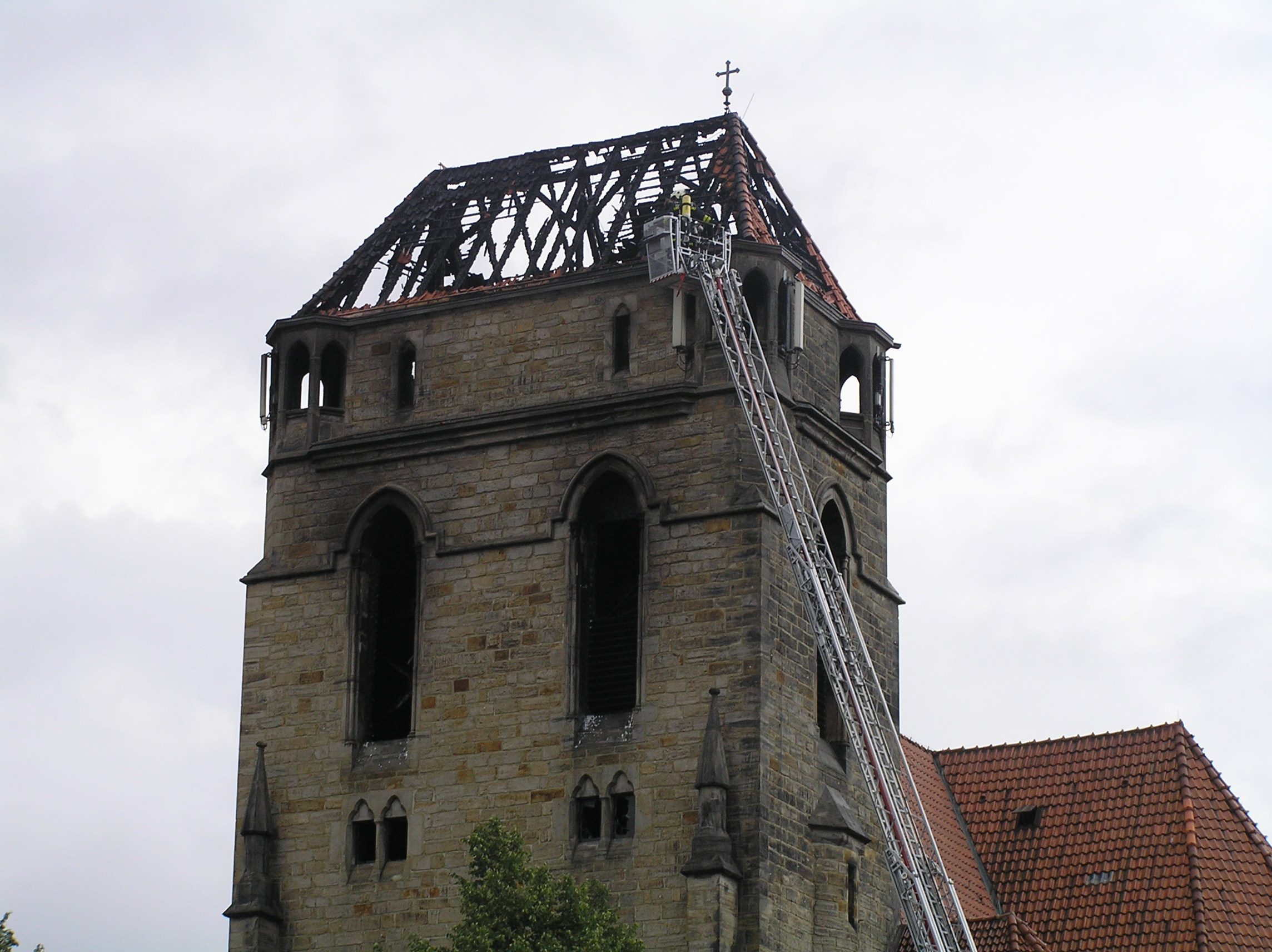 Feuer Jugendkirche Hannover